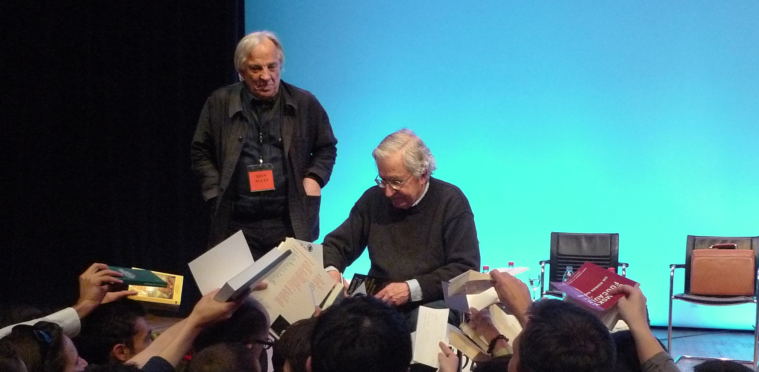 Noam Chomsky dédicace ses livres à la Mutualité à Paris le 29 mai 2010. Debout à sa droite se tient le journaliste français Daniel Mermet.